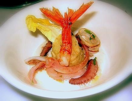 rivisitazione dello Stoccafisso alla messinese